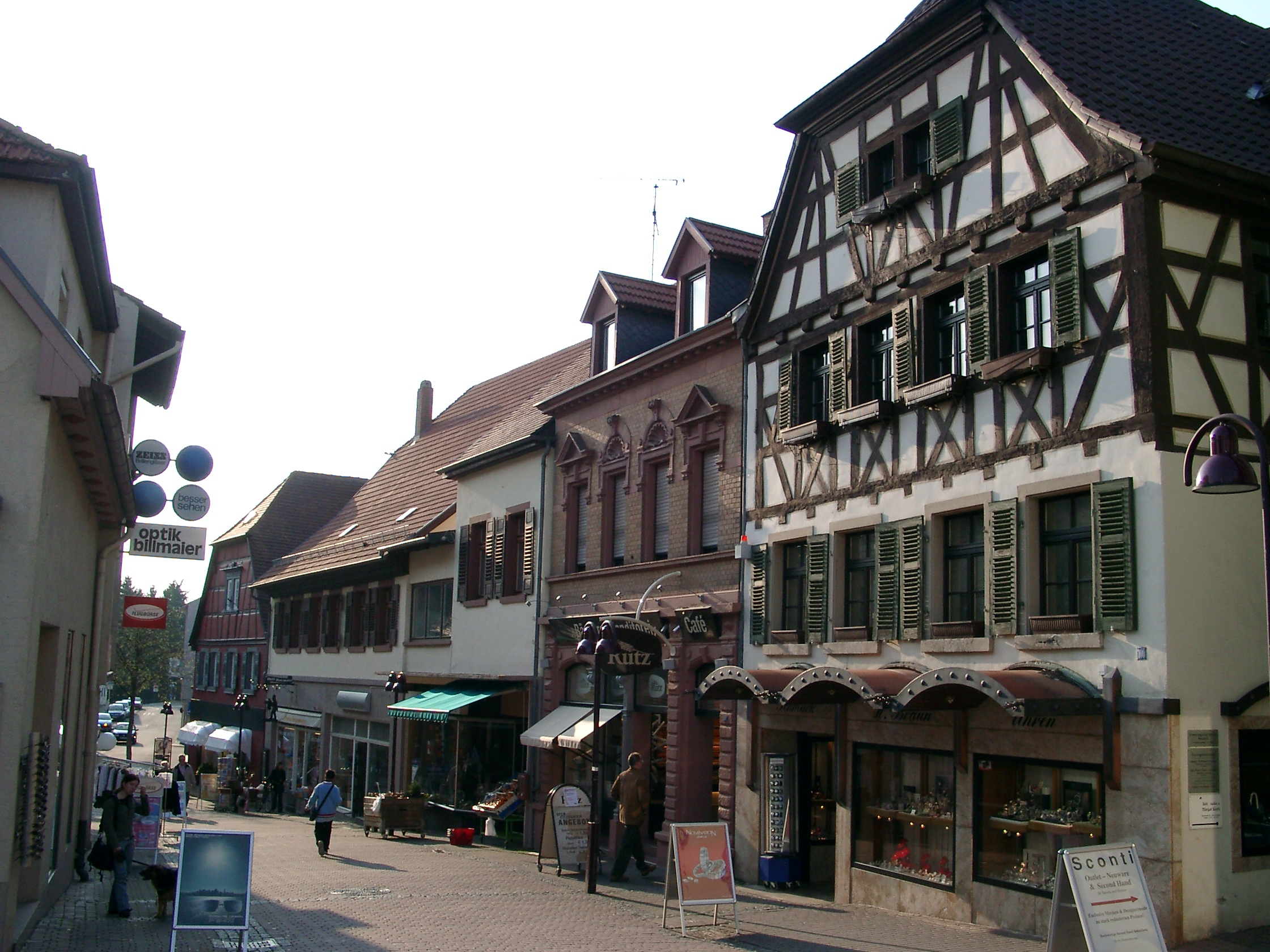 Wiesloch, Blick in die Altstadt